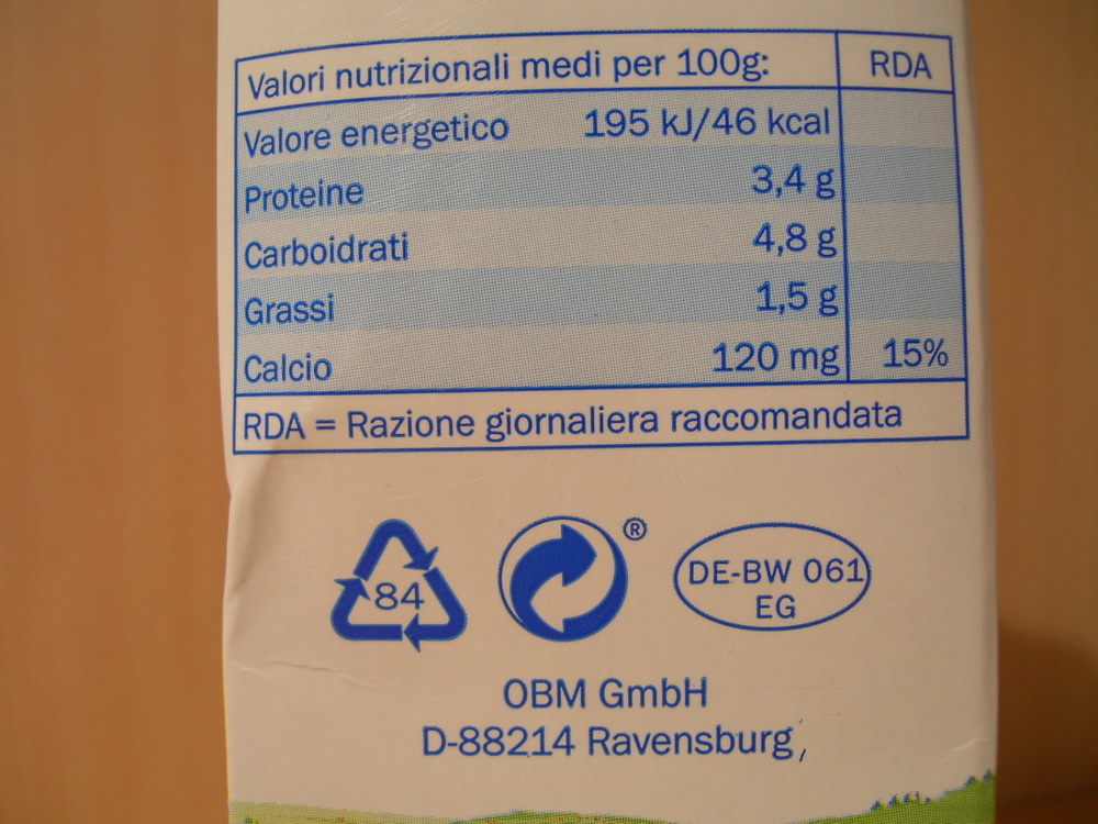 Cartone di latte a lunga conservazione